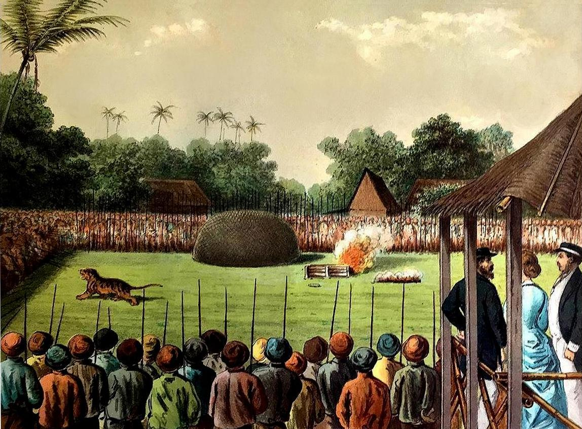 Das Töten von Tigern im Schauspiel „Rampok“ am Hof von Surakarta (Java)